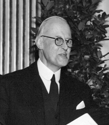 Börschef Kurt Belfrage.